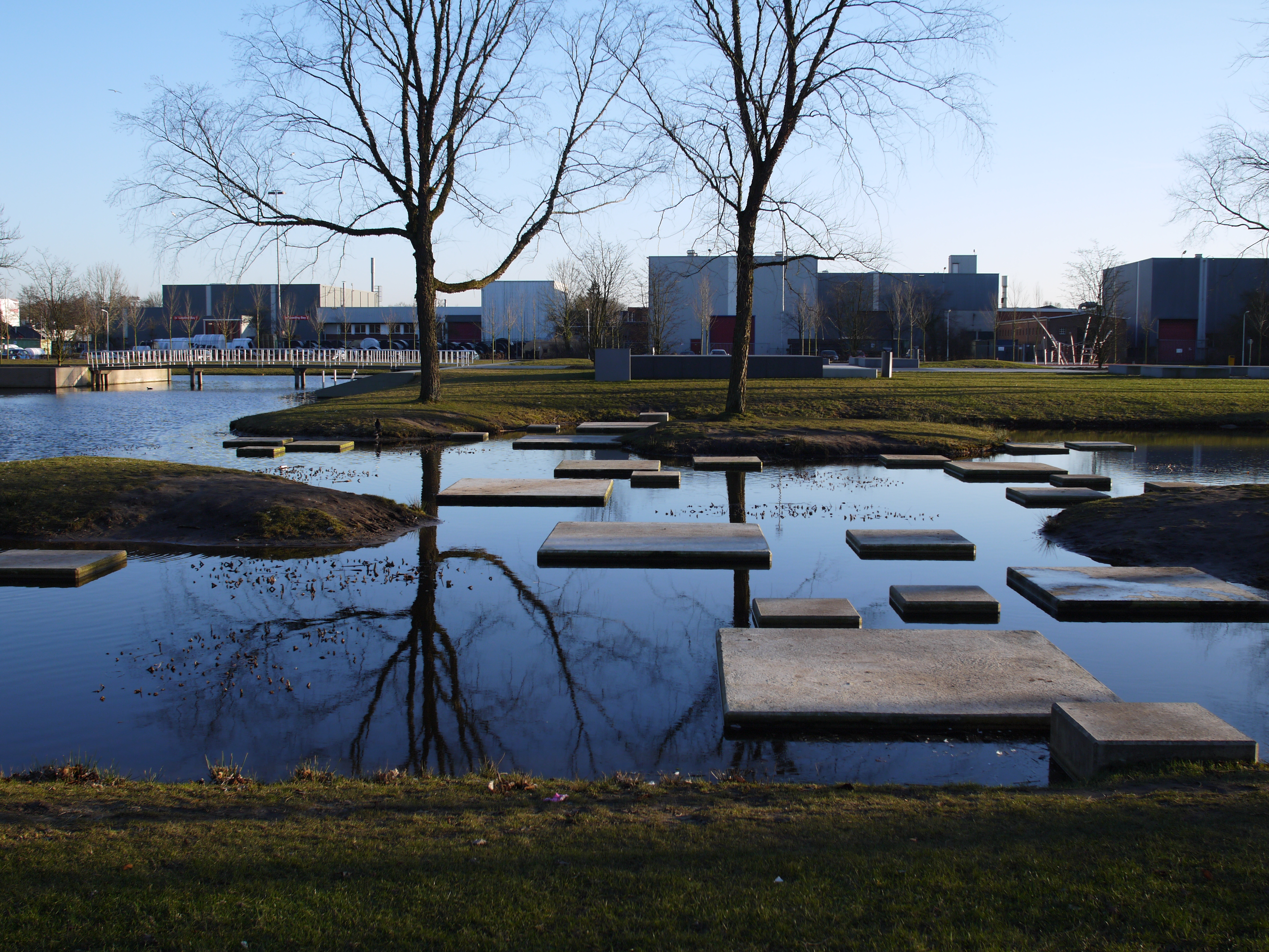 Thalenpark Drachten